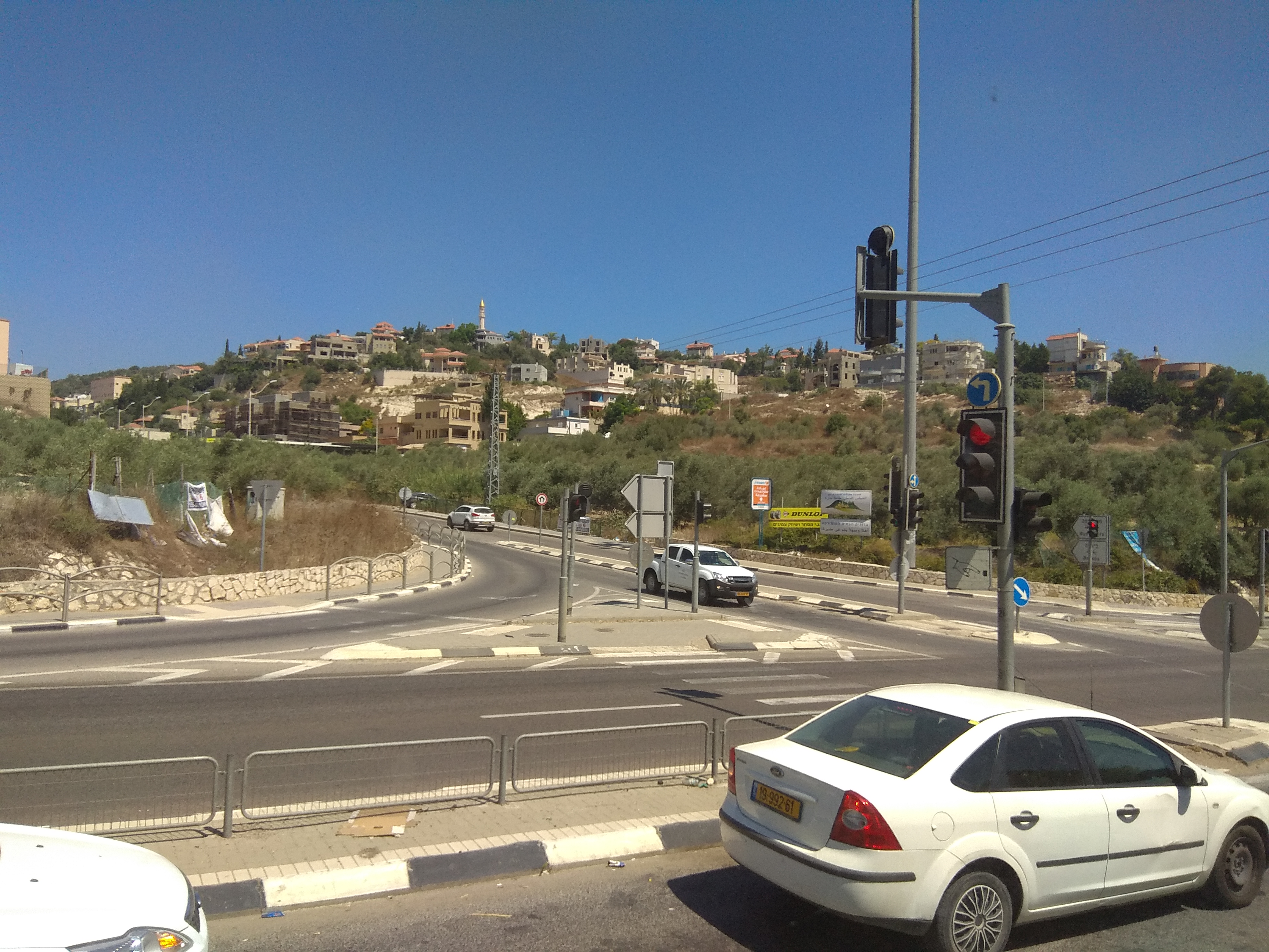 צומת הכניסנה למושיירפה